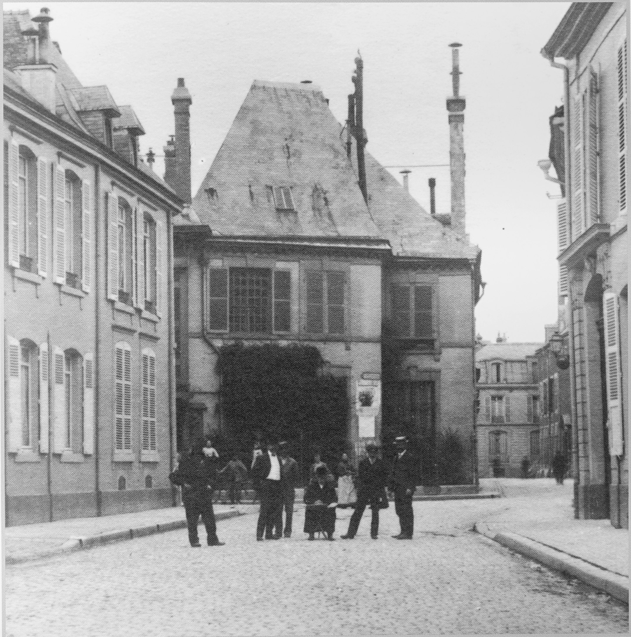 de l'artiste e Auger.